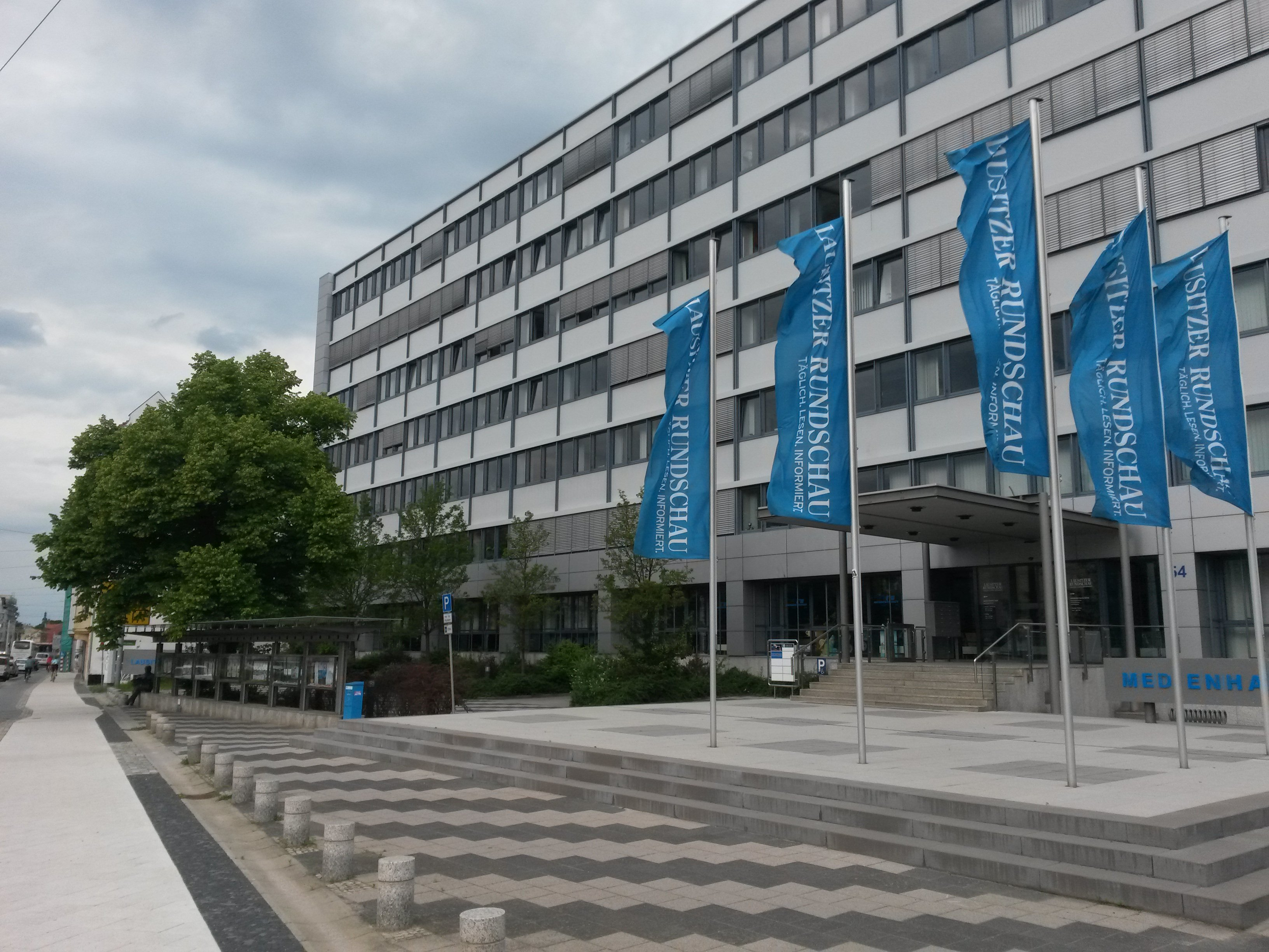 Sitz der Lausitzer Rundschau in der Straße der Jugend in Cottbus